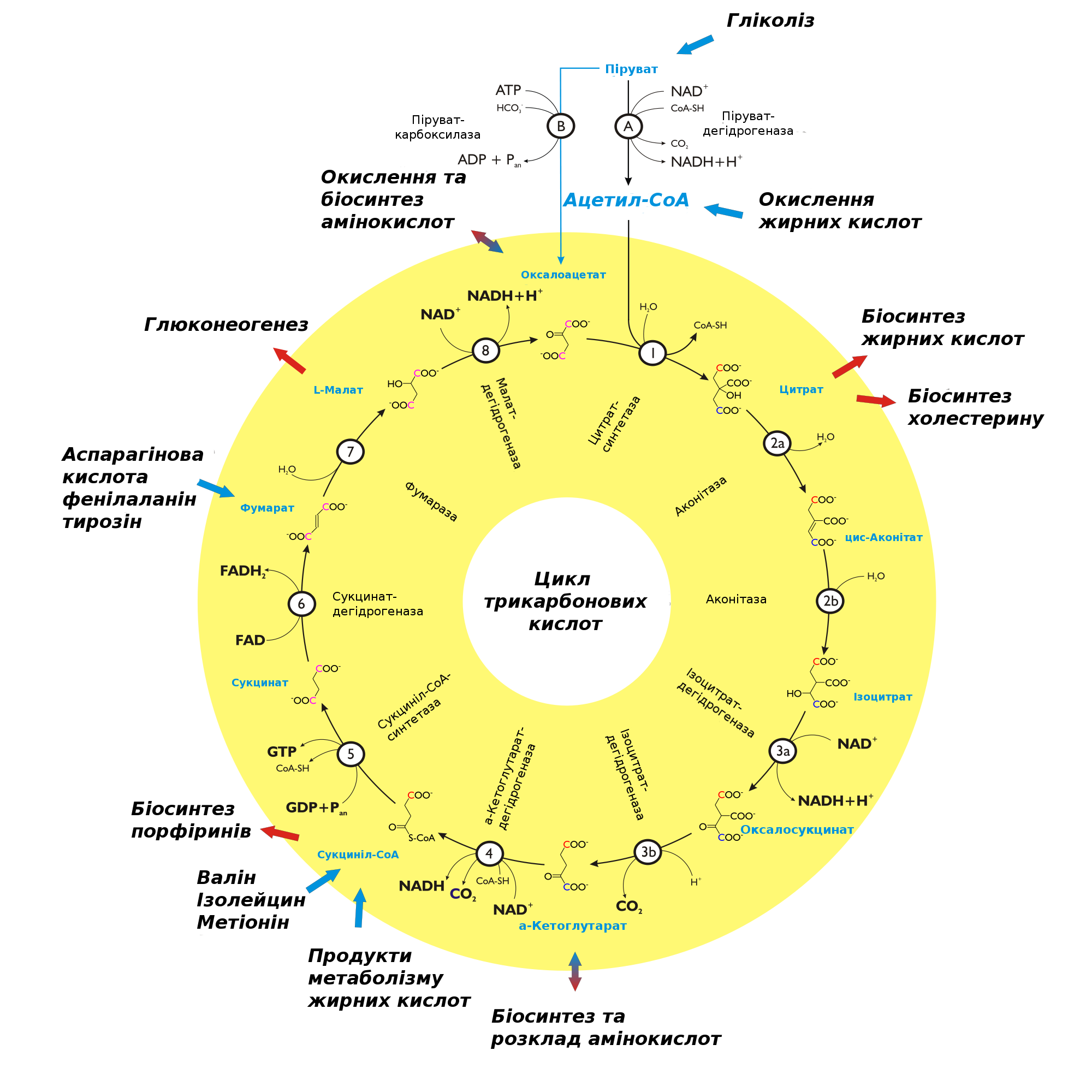 2000px-Citratcyclus